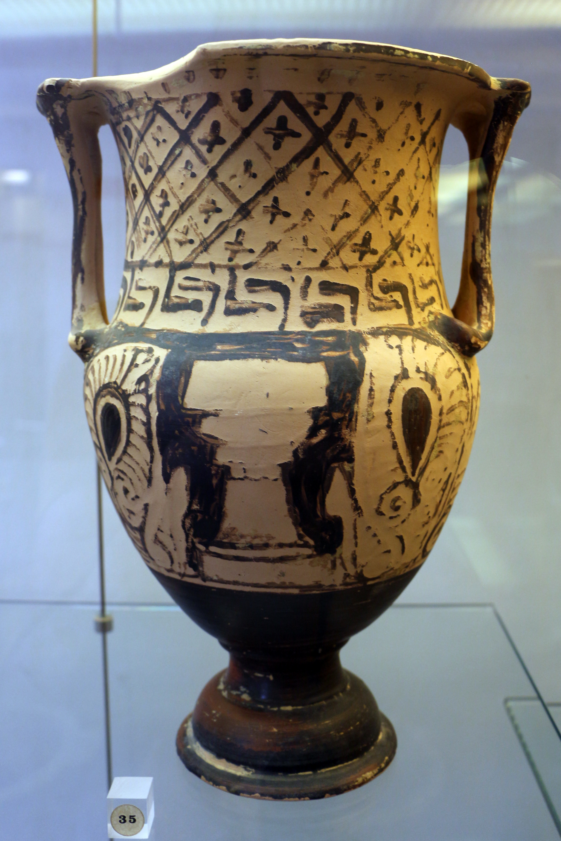 Etruscan pottery in the Museo Guarnacci This is a photo of a monument which is part of cultural heritage of Italy.